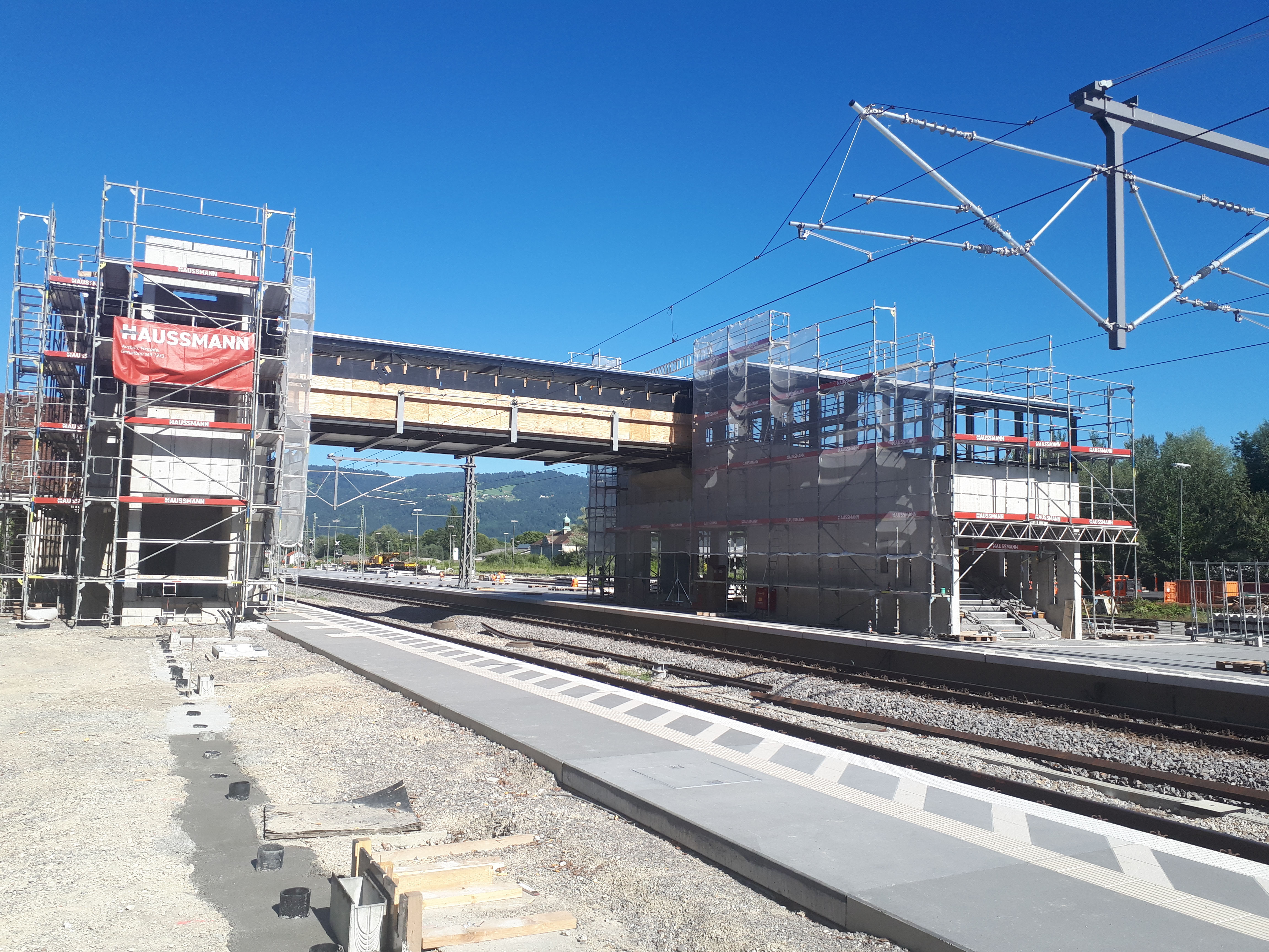 Bahnhof Lindau Reutin (Stand der Bauarbeiten Juli 2020). Die Bahnsteige und die Überführung sind im Rohbau fertig.